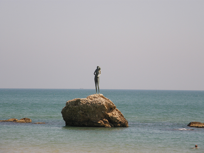 Vasto